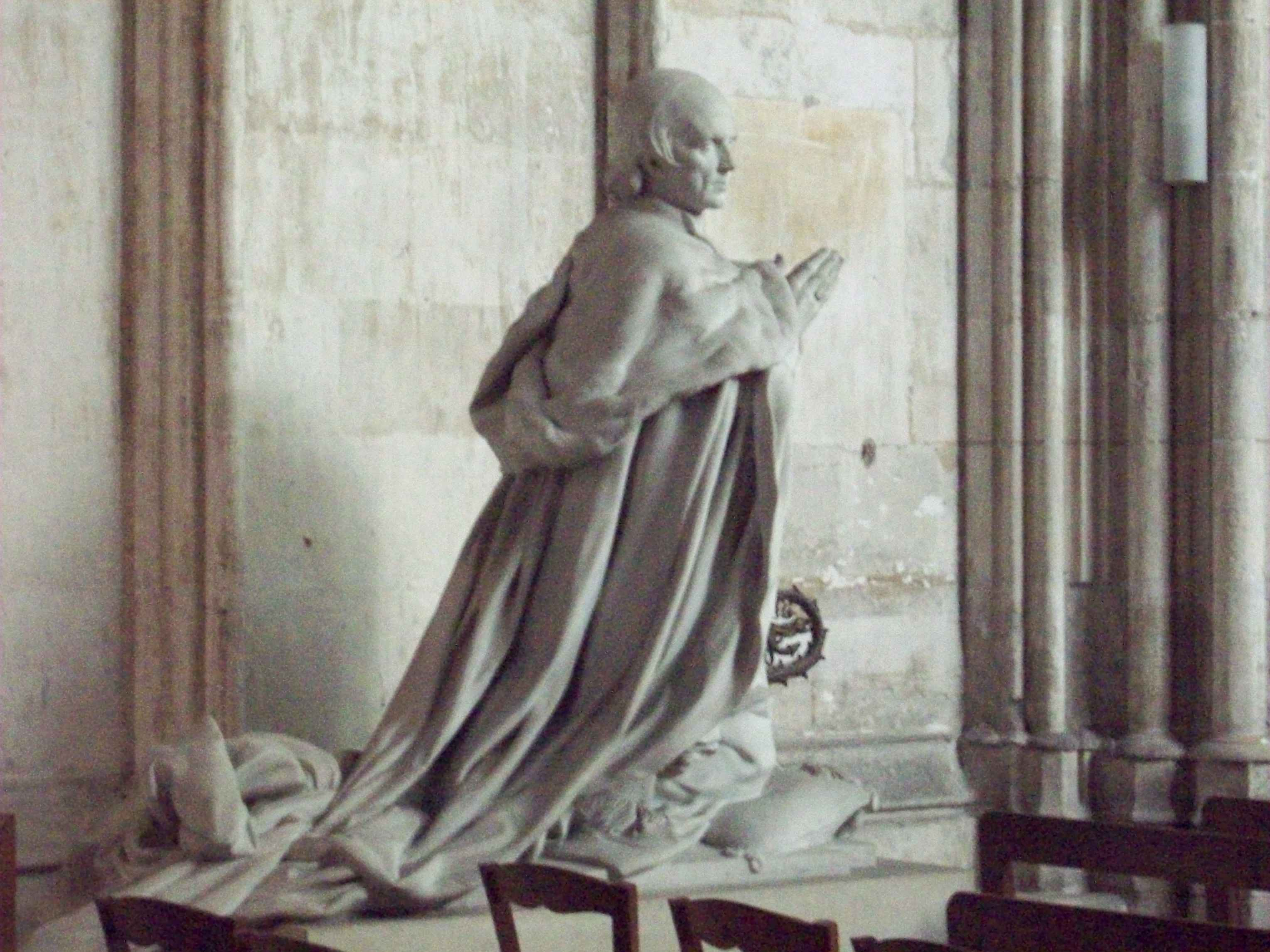 Priant du cardinal de Bonnechose, dans la chapelle de la Vierge.